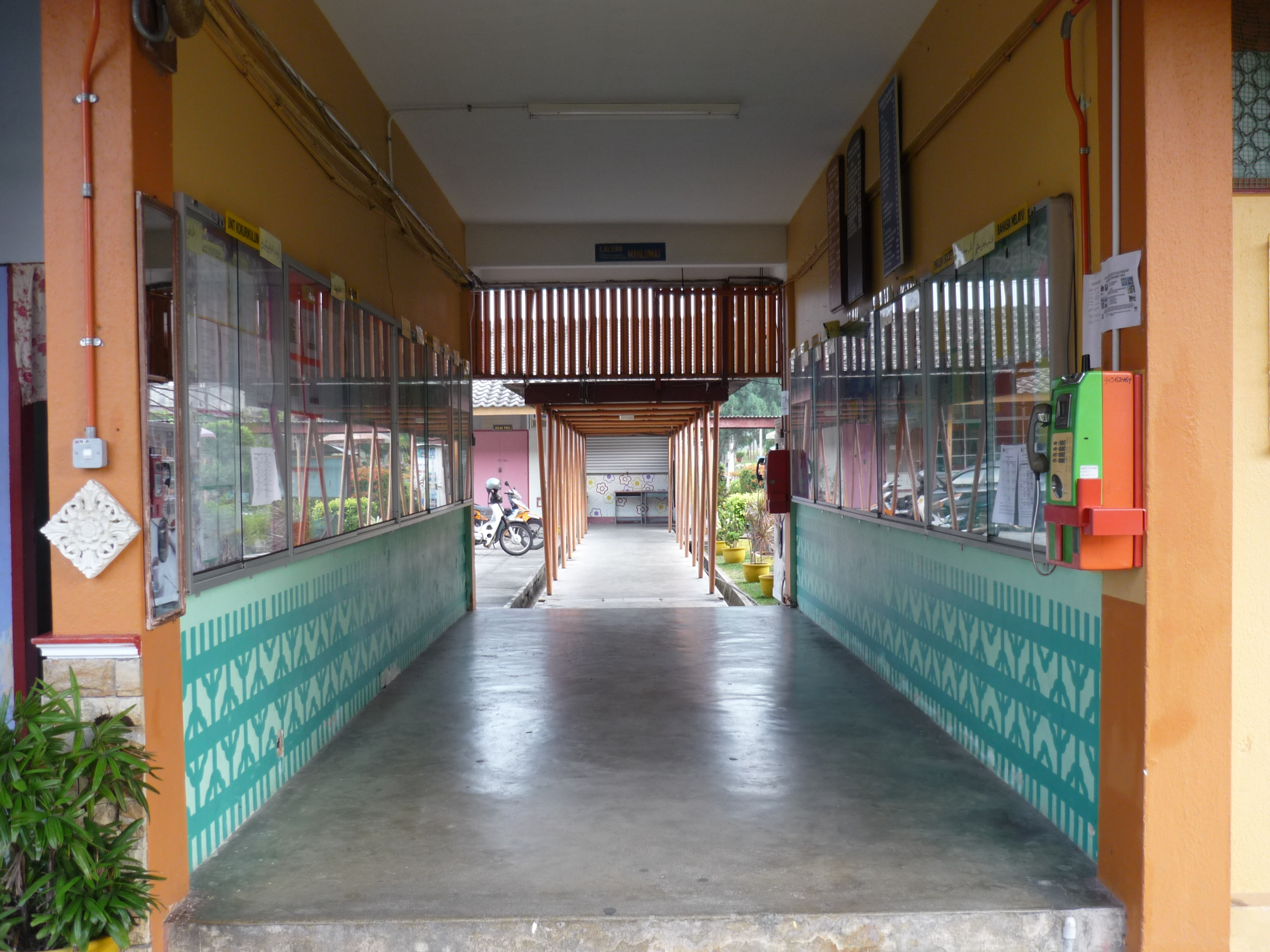 Laluan koridor yang penuh dengan maklumat